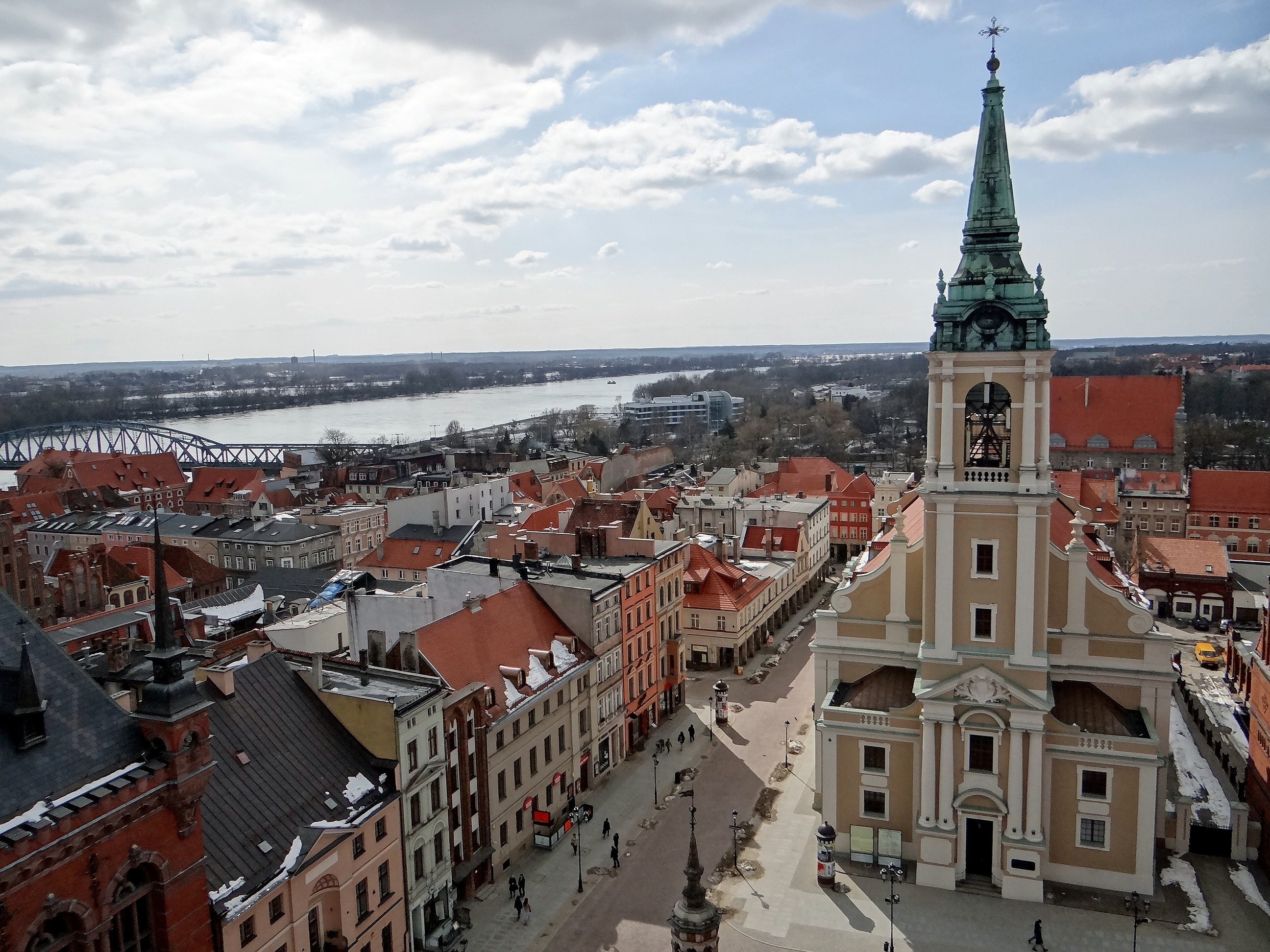 kościół akademicki św. Ducha w Toruniu, 1743-56, 1897-99